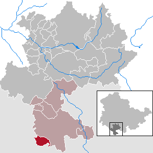 Schweickershausen in Thuringia - district Hildburghausen